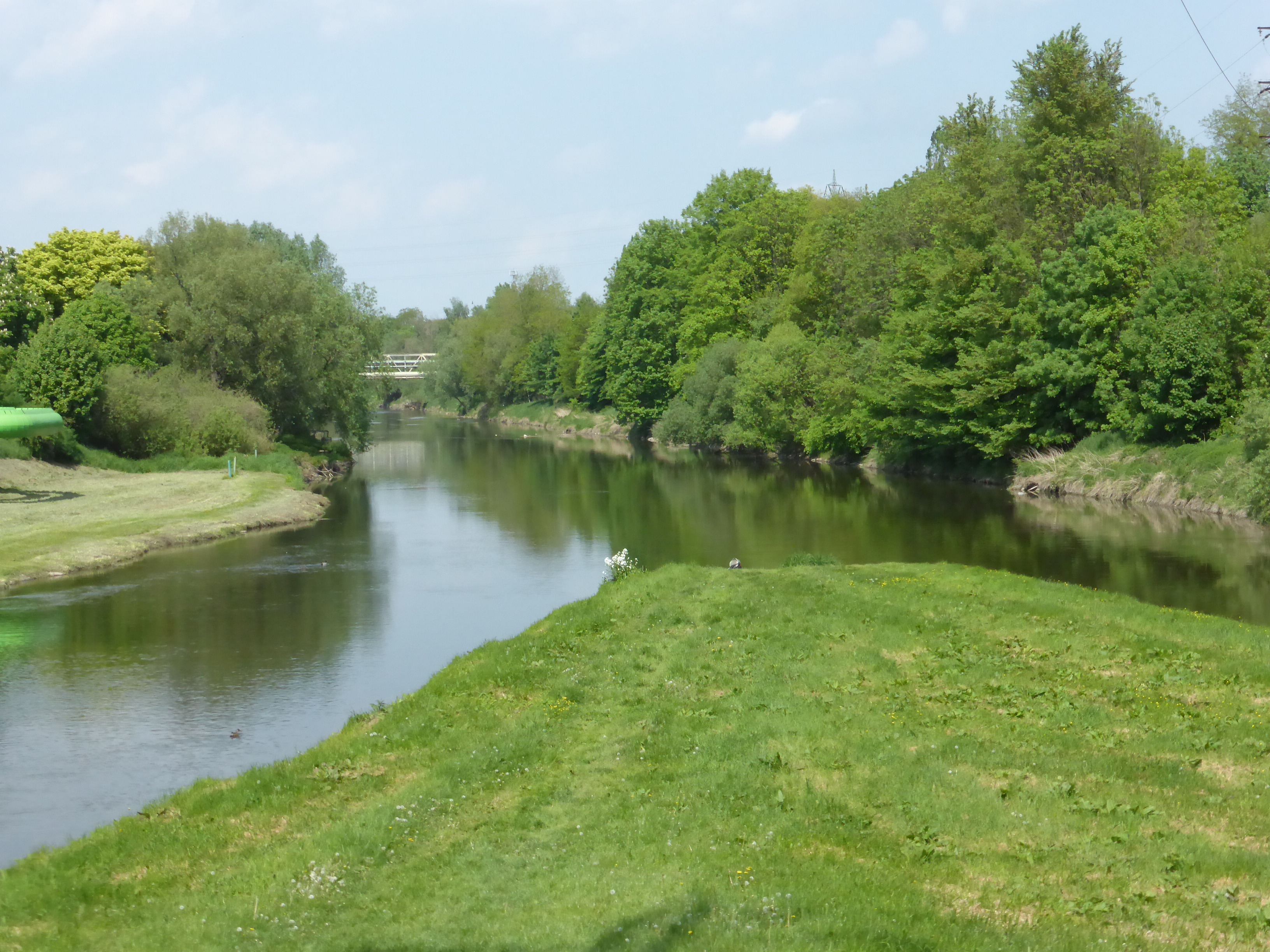 Soutok Mže a Radbuzy k Berounke v Plzni.